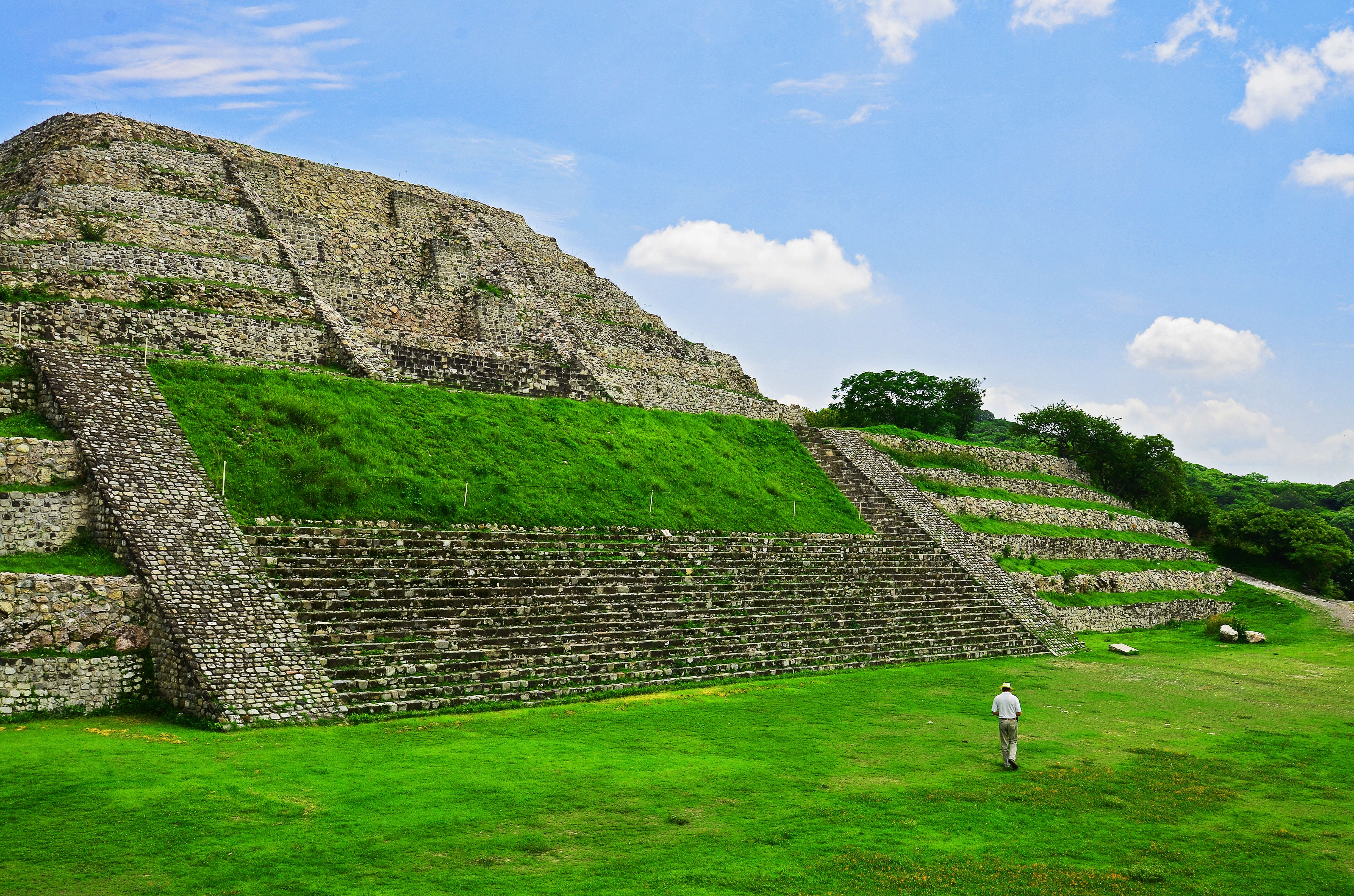 Xochicalco